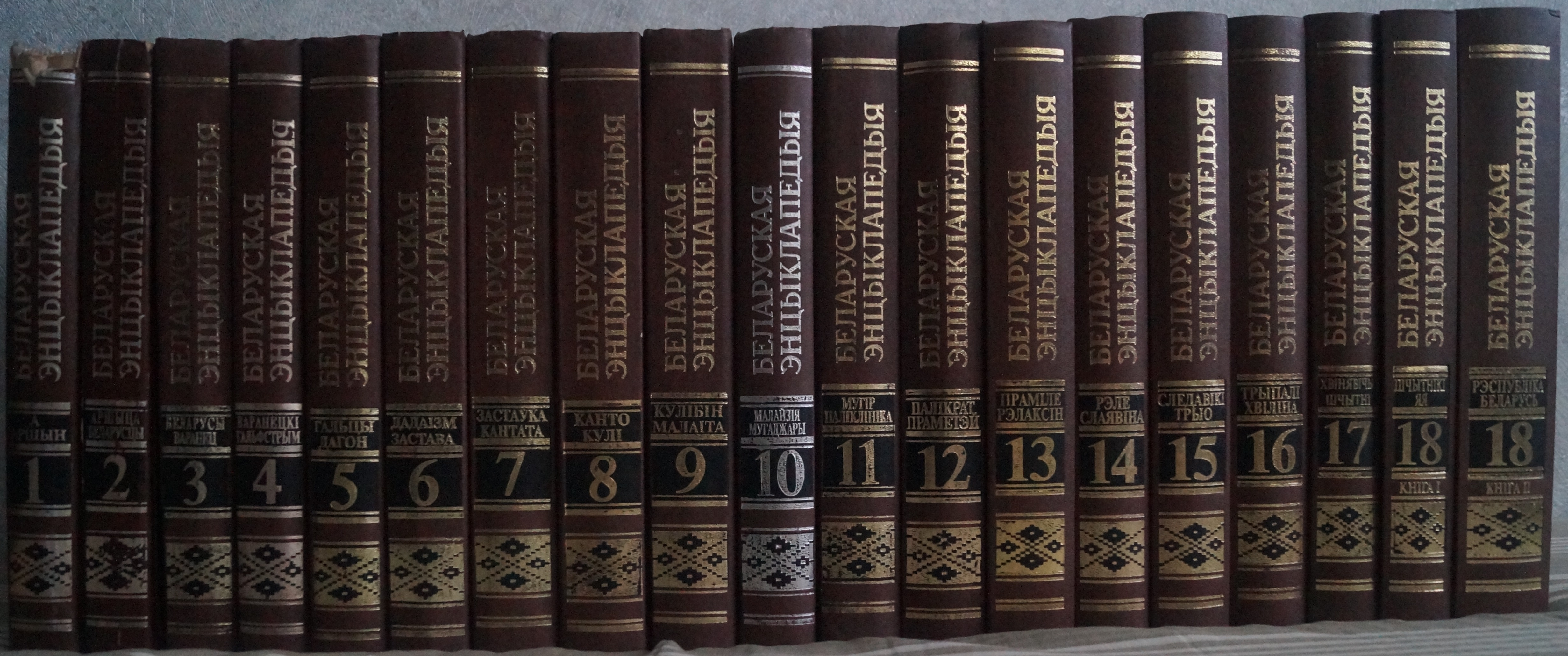 Беларуская (тарашкевіца): Унівэрсальная Беларуская энцыкляпэдыя, т. 1—18/2